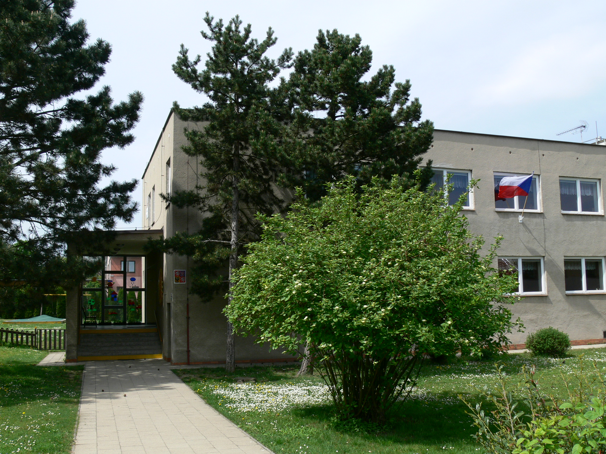 Dědice, Pazderna, Mateřská škola Dědická